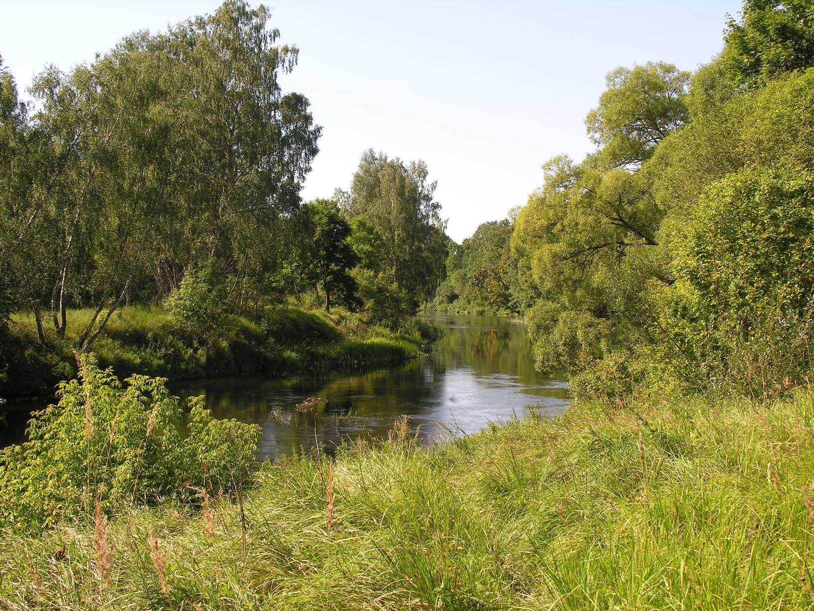 Venta ties Krakiais, Mažeikių raj. Foto: Algirdas, 2005 m. liepos mėn.